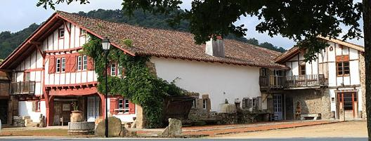 Inharri baserria (Ibarron, Senpere, Lapurdi)